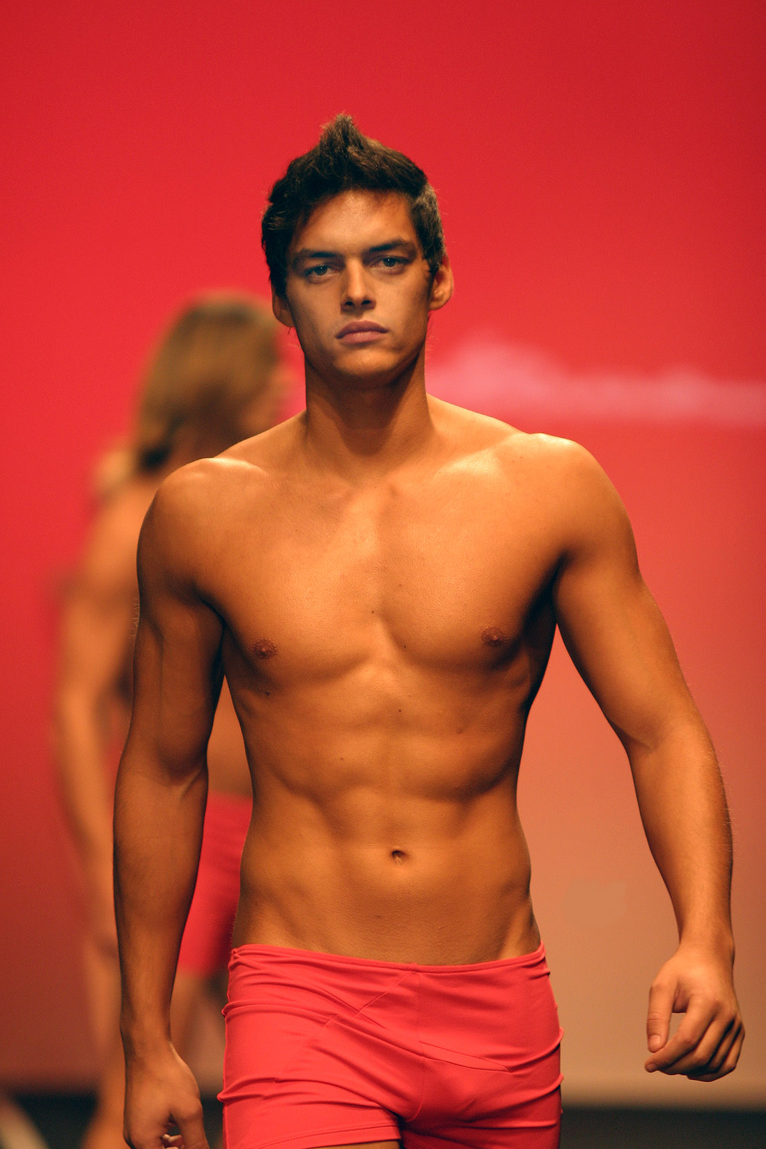 Summer 2005